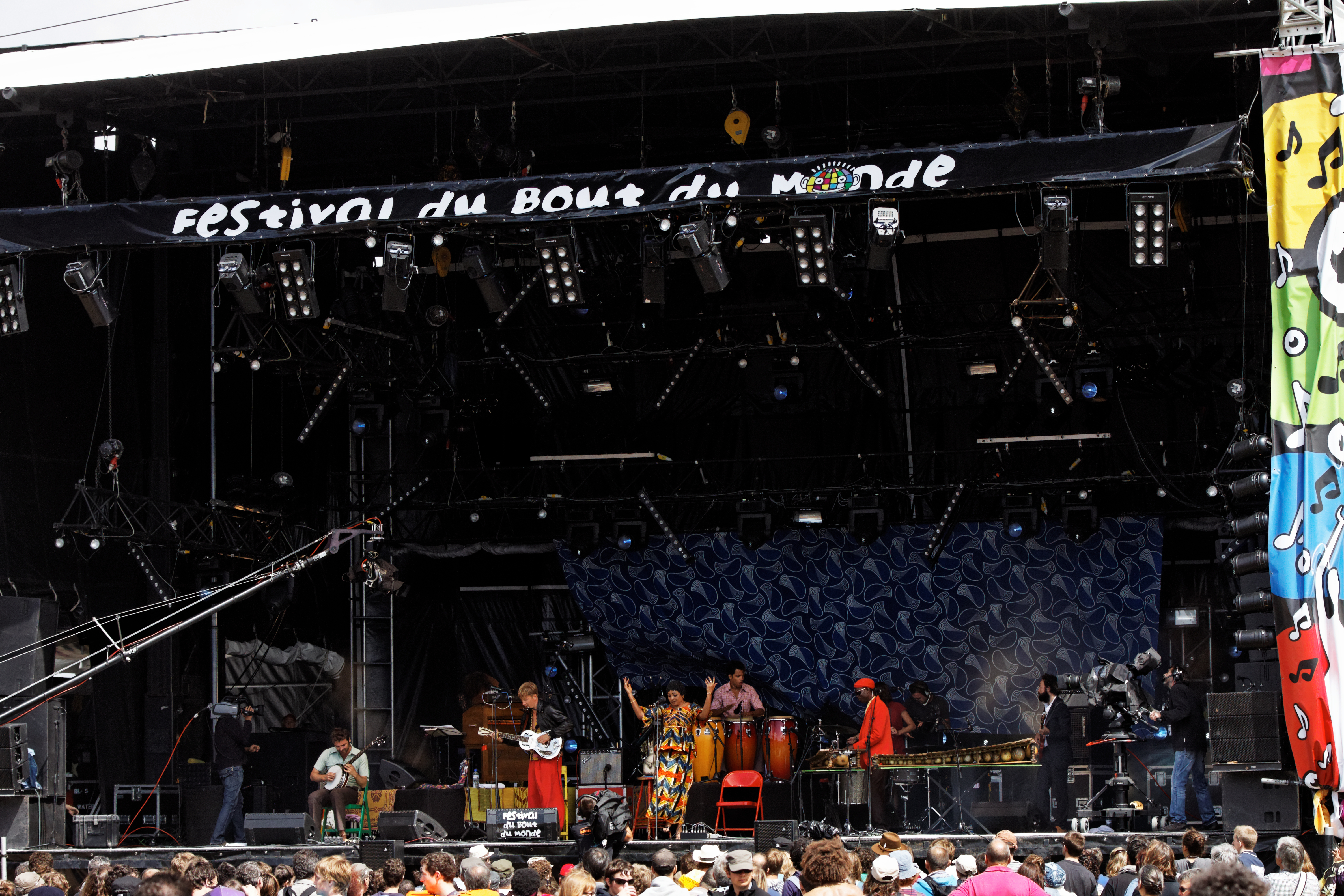 Zita Swoon Group, avec Awa Démé et Mamadou Diabaté Kibié, en concert sur la scène Landaoudec lors du festival du bout du Monde à Crozon dans le Finistère (France).